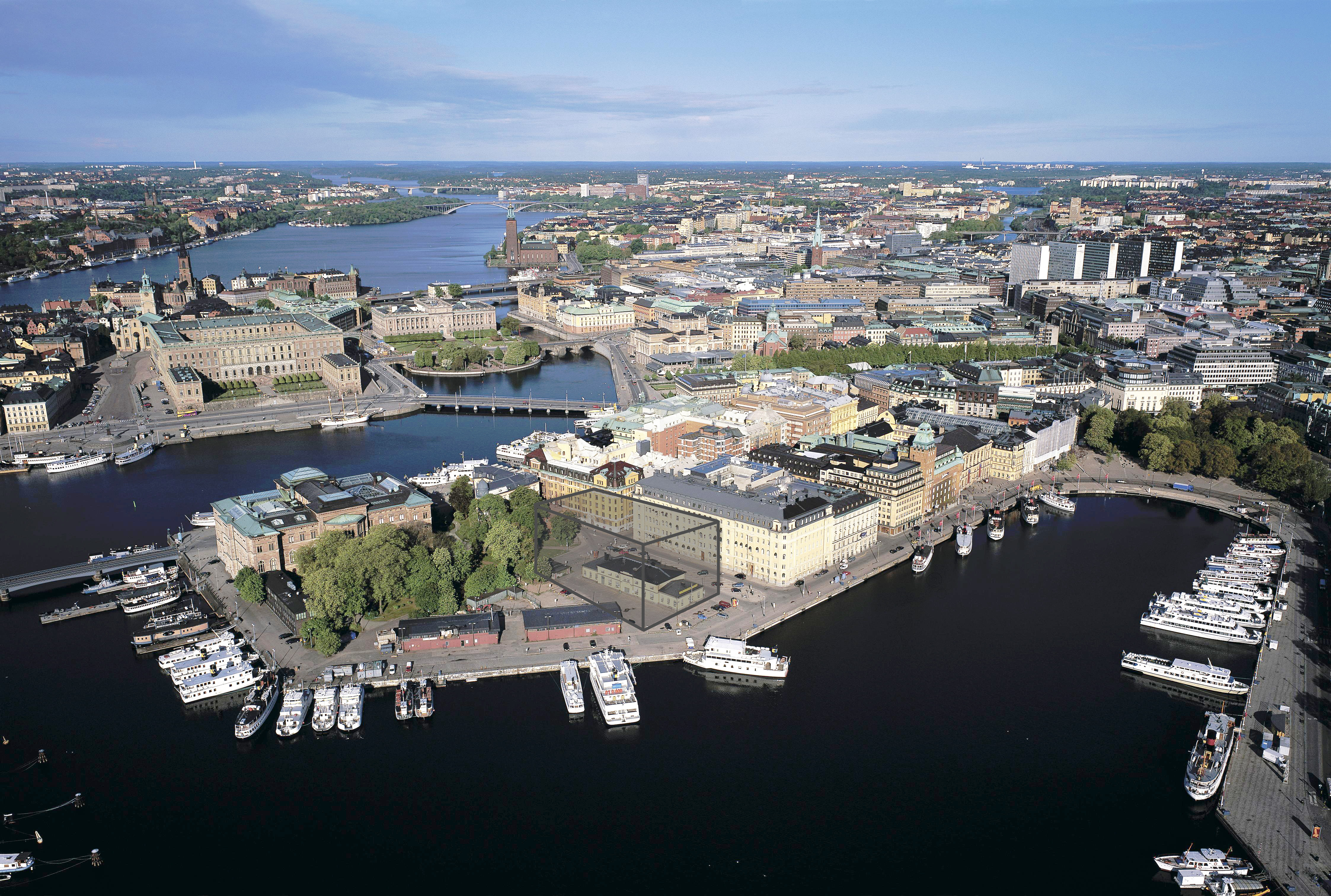 Blasieholmen med inlagd volym för planerade Nobelcenter